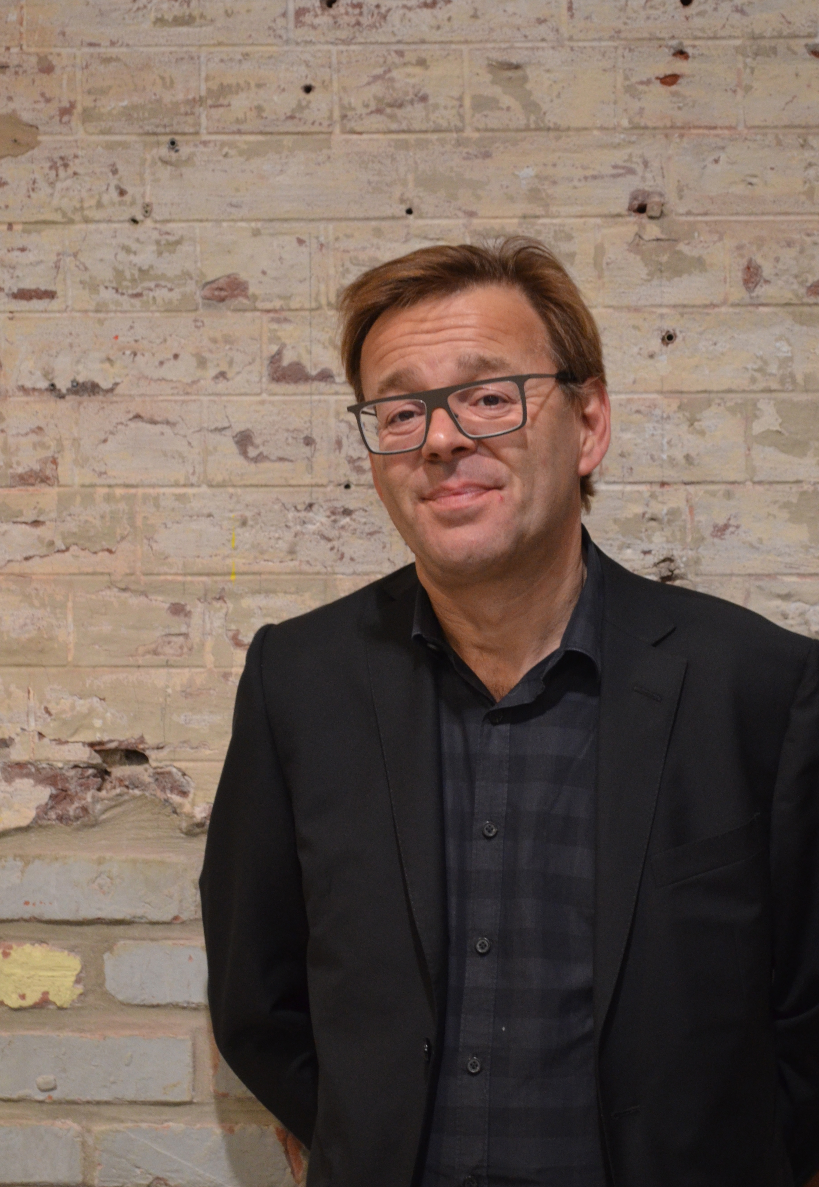 Wim Delvoye, artiste plasticien belge, le 25 septembre 2015 au BPS22 à Charleroi.